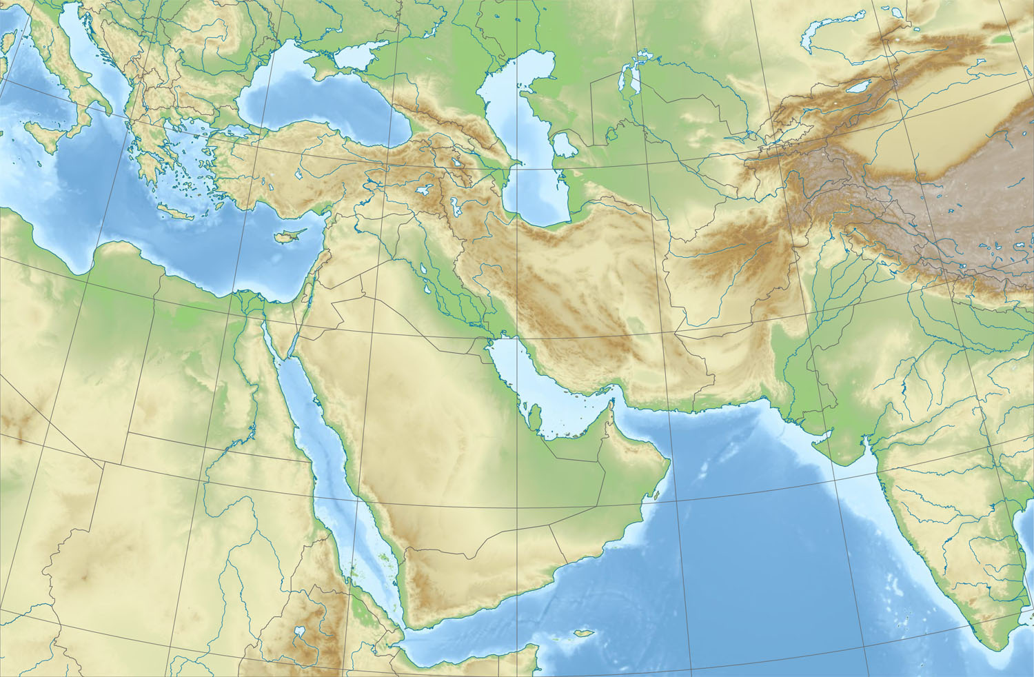 Физическая карта Ближнего и Среднего Востока Проекция — коническая равнопромежуточная. первая стандартная параллель — 20°00′с.ш. вторая стандартная параллель — 40°00′с.ш. средний меридиан — 50°00′с.ш. Формулы расчёта координат: x = 50.0 + 143.2394488 * (2.238026669-( {2 }*pi / 180)) * sin(0.497465385 * ( {1 } - 50) * pi / 180) * 0.654 y = 50 - 143.2394488 * (1.714427893 - (2.238026669-( {2 }*pi / 180)) * cos(0.497465385 * ( {1 } - 50) * pi / 180))